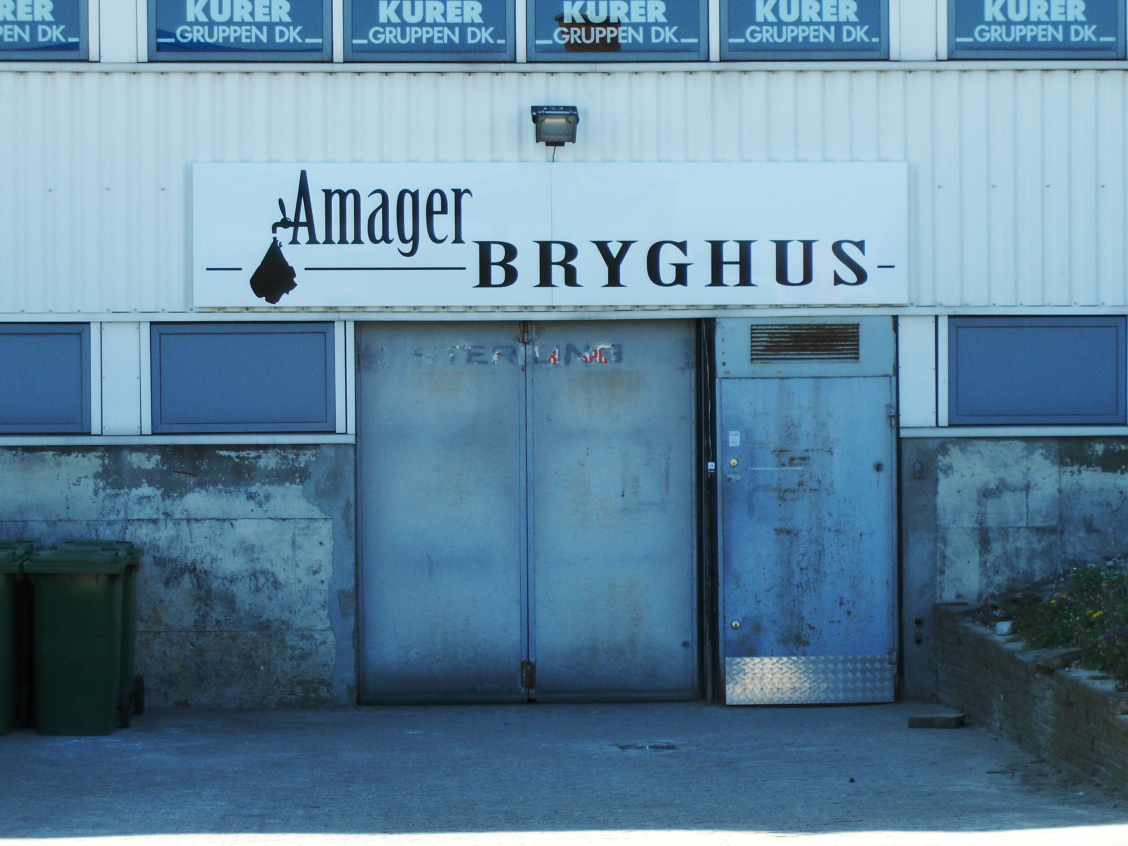 Hovedindgangen hos Amager Bryghus